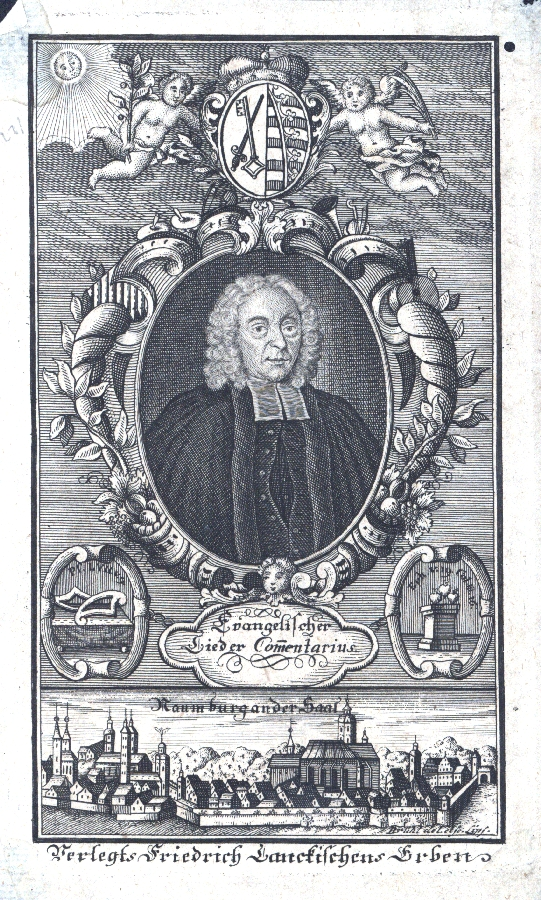 Bildnis des Naumburger Pfarrers Johann Martin Schamel(ius) (1668-1742) mit Ansicht von Naumburg von Johann Benjamin Brühl ca. 1710